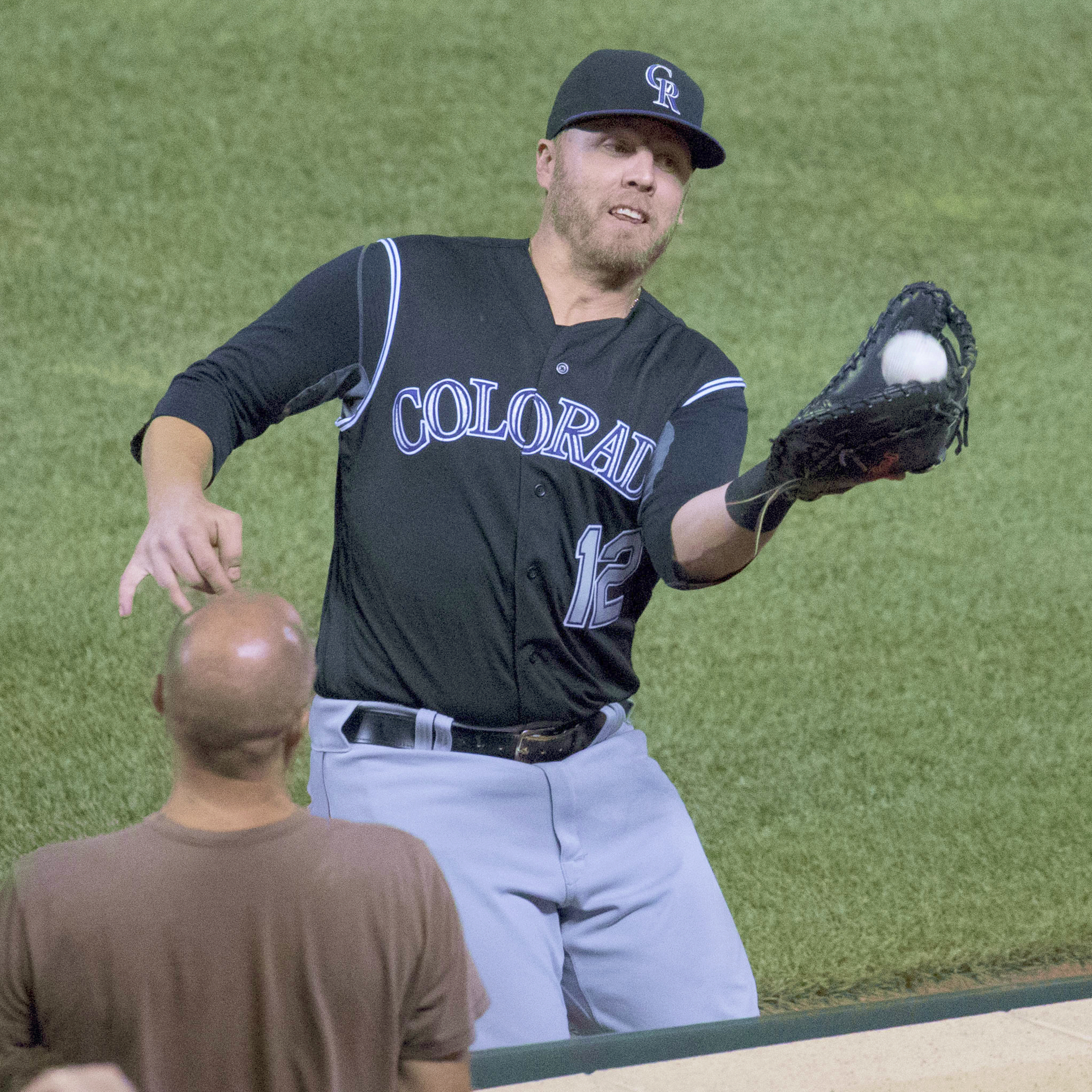 Mark Reynolds